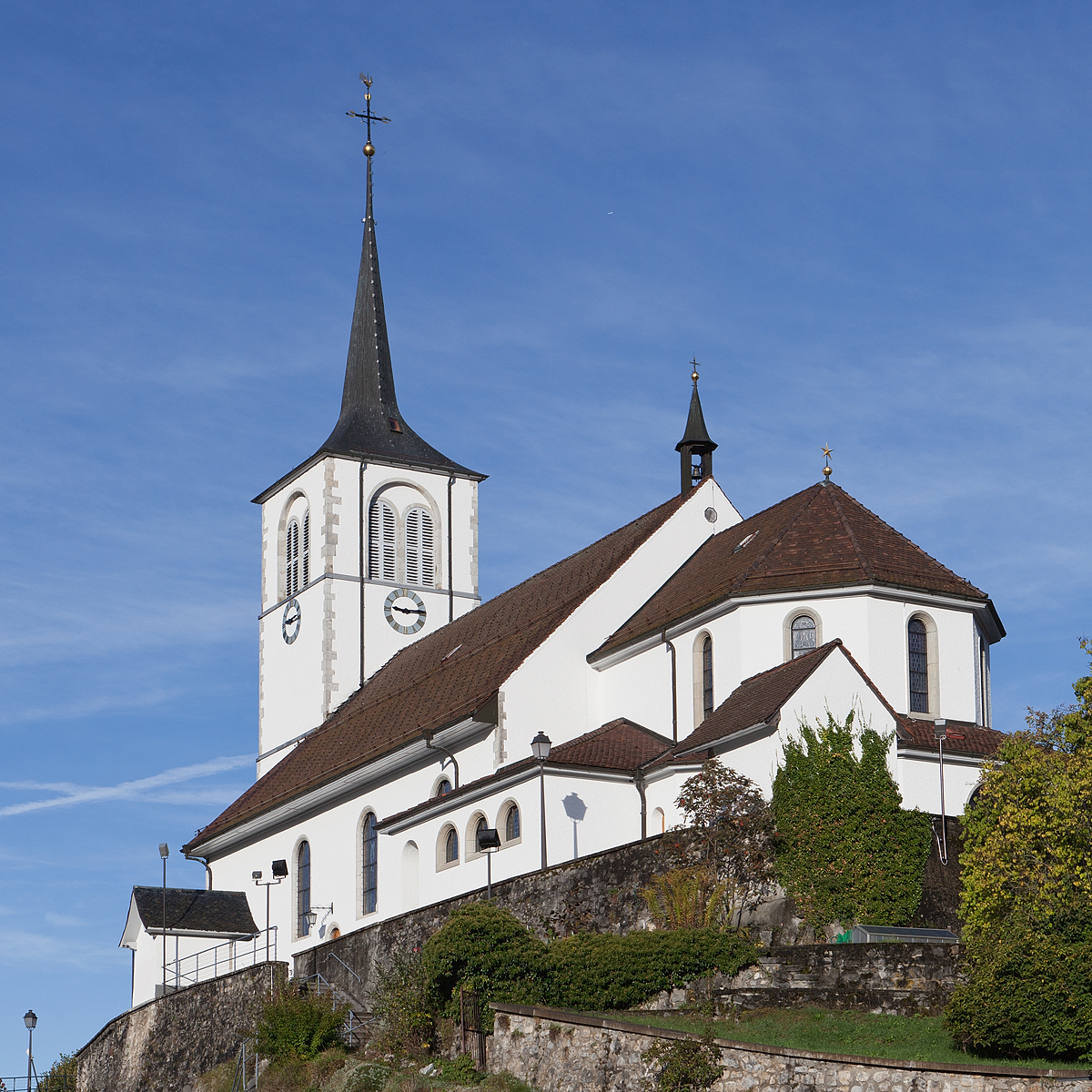 Eglise Saint-Laurent à Charmey (FR)